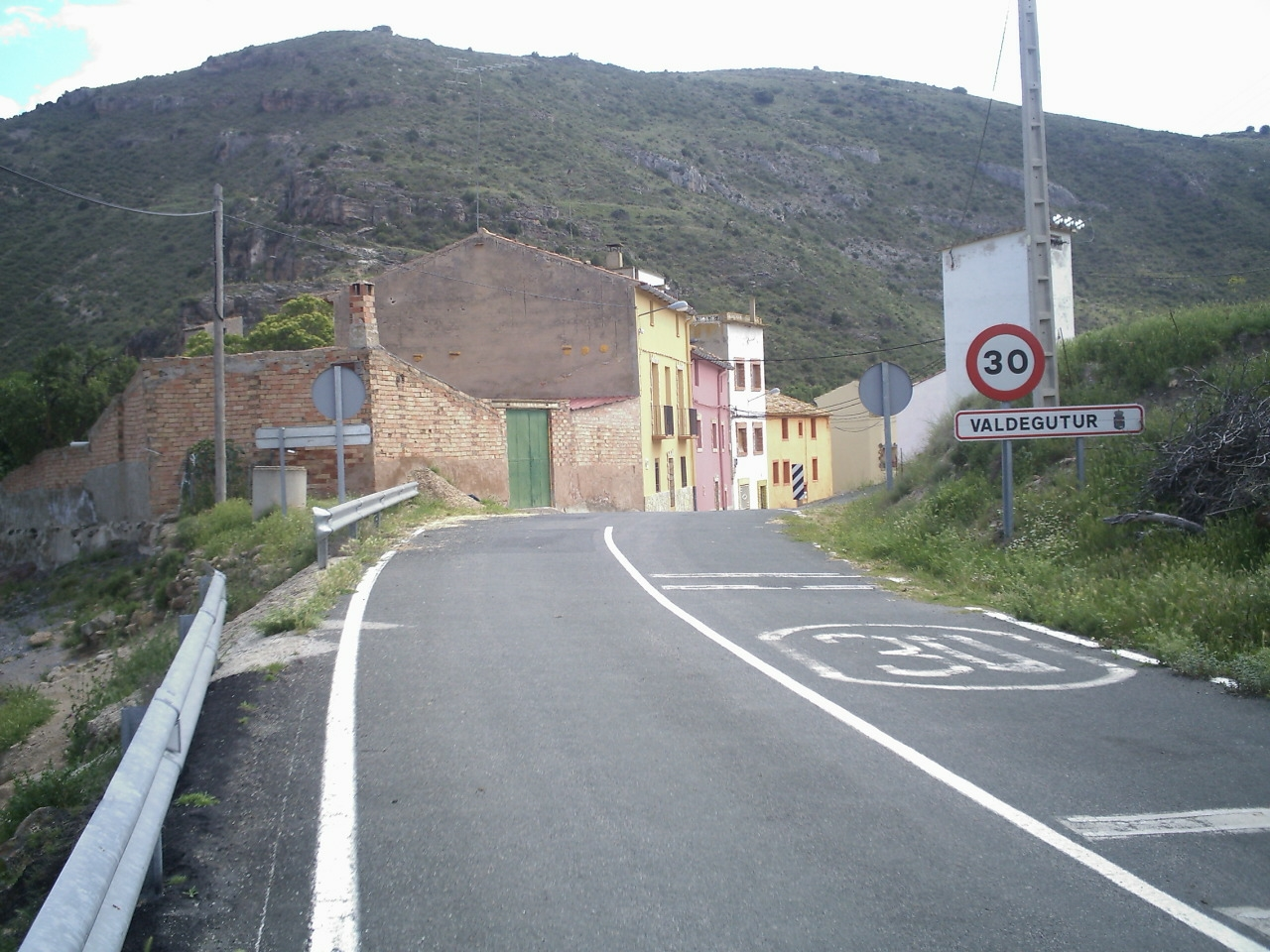 Valdegutur - La Rioja (Spain)